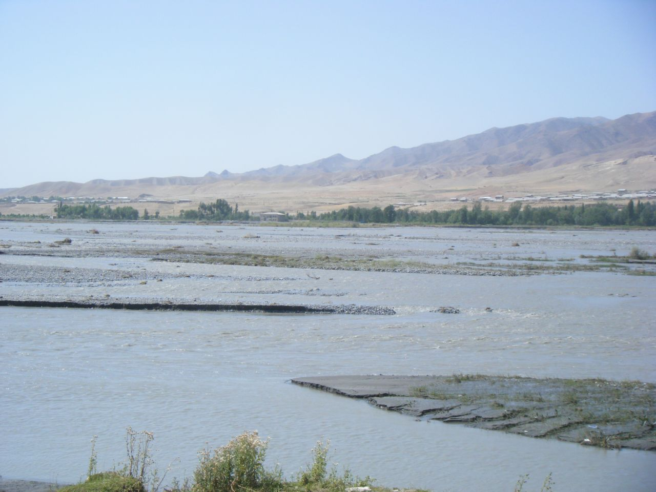 Зеравшан у Таджикистані, квітень 2009 року